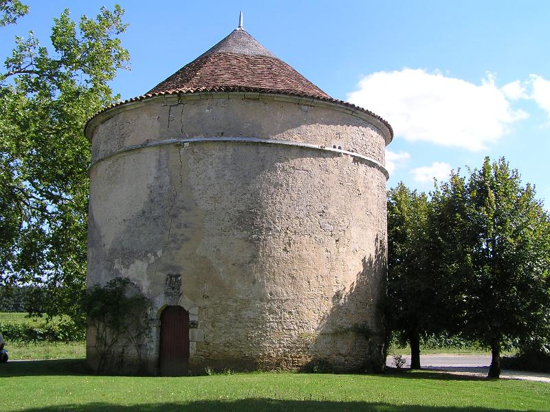 fuie 16°